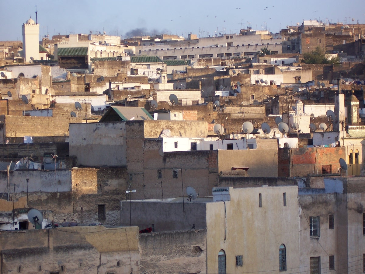 Fez, Morocco